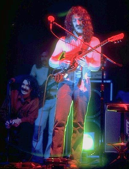 New Haven, CT